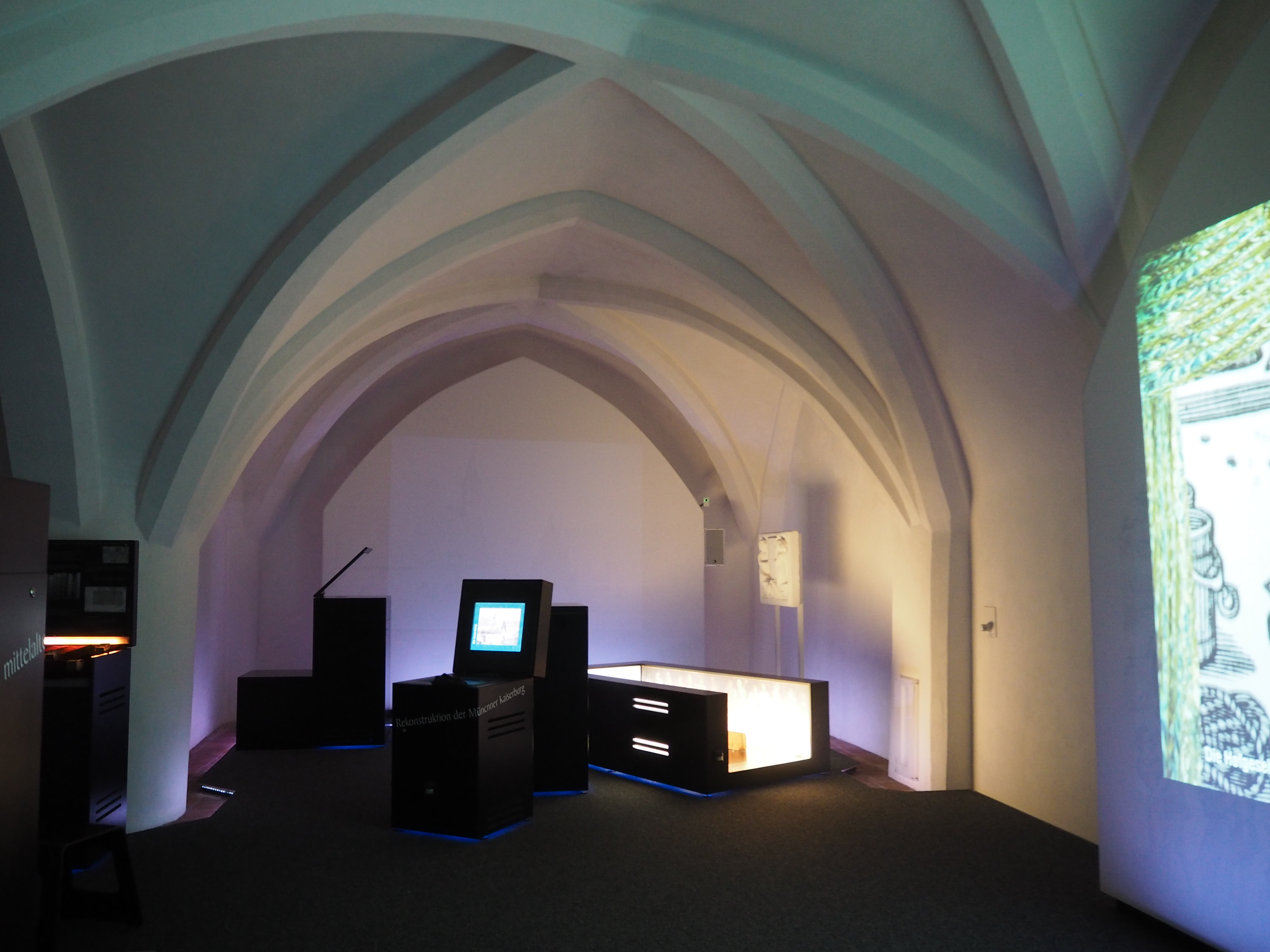 Ausstellungsfläche des Museums Münchner Kaiserburg im Alten Hof